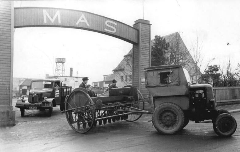 Chemnitz, Ausfahrt eines Schleppers mit Sämaschine Illus Seidel 26.2.1951 Alles bereit zur Frühjahrsbestellung 1951. Die Maschinenausleihstation in Chemnitz ist für den "Tag der Bereitschaft", 3. bis 4. März 1951, gut gerüstet. Alle zur Verfügung stehenden Traktoren und Ackergeräten wurden für die diesjährige Frühjahrsbestellung instandgesetz und neuüberholt. UBz: EinTraktor mit Drillmaschine bei der Bereitschaftsprobe. (Chemnitz ab 1953 Karl-Marx-Stadt) Leihweise Illus Berlin W 8